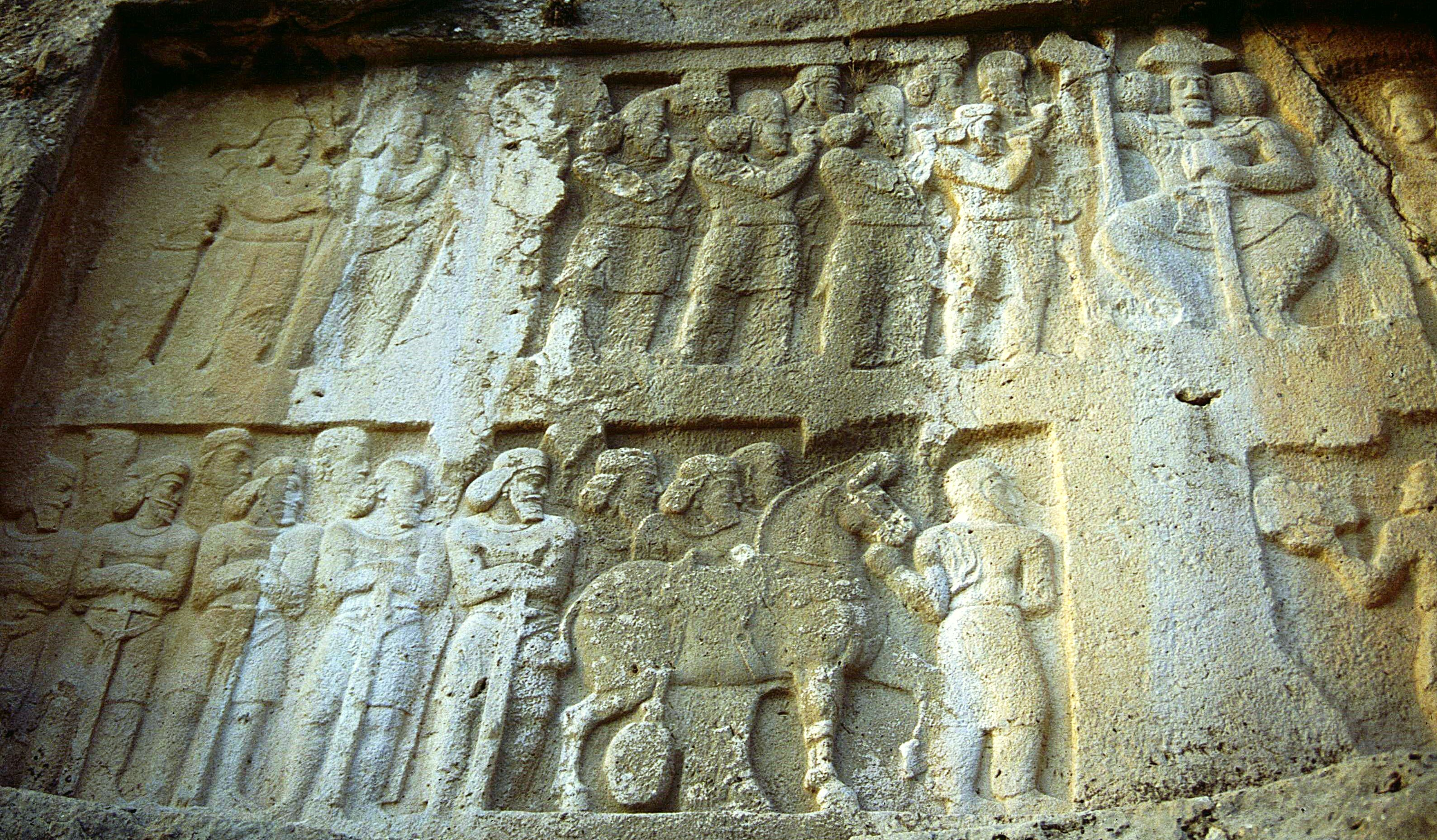 Bishapur: Shapur II.